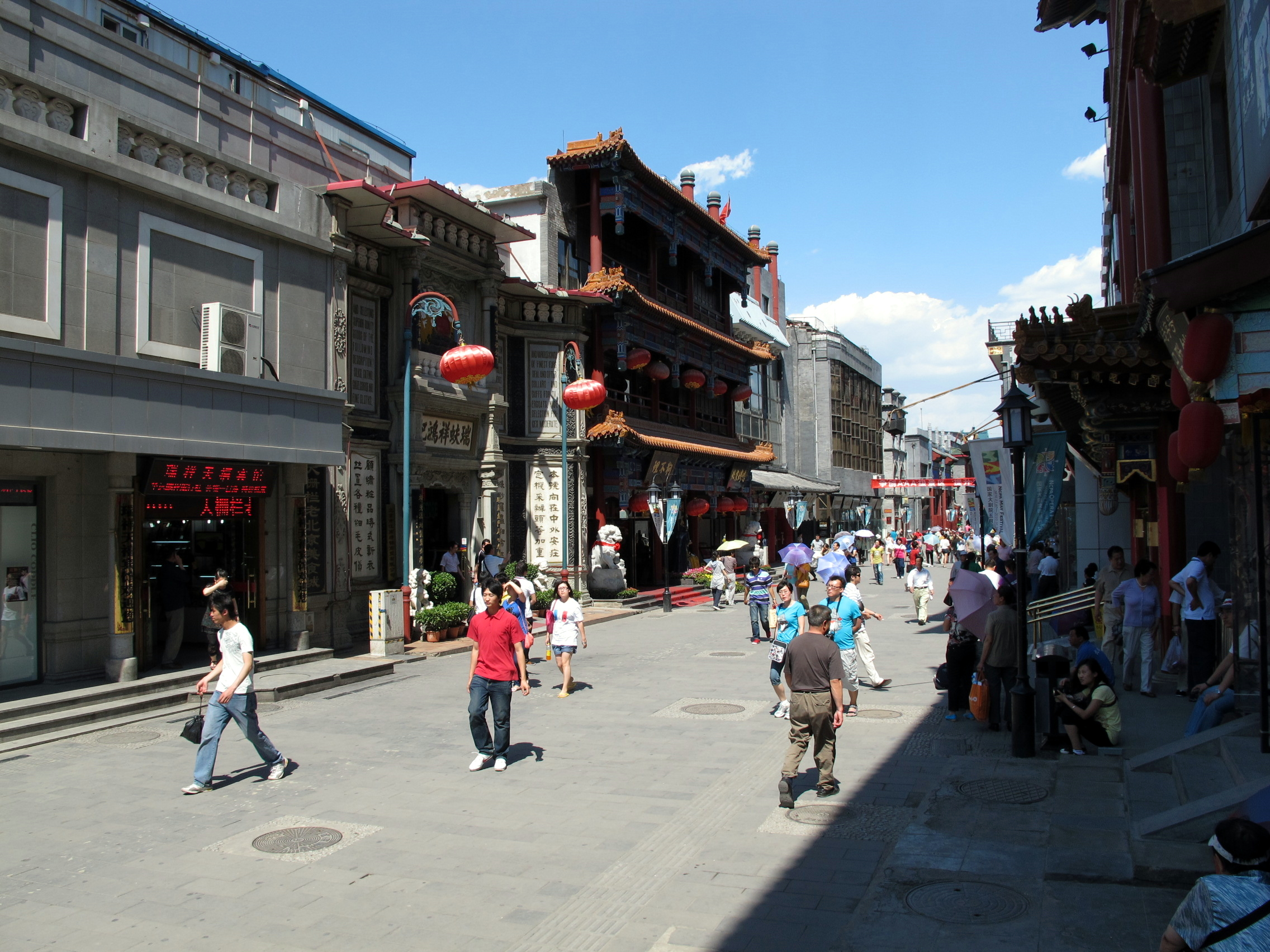 Dashala 大柵欄